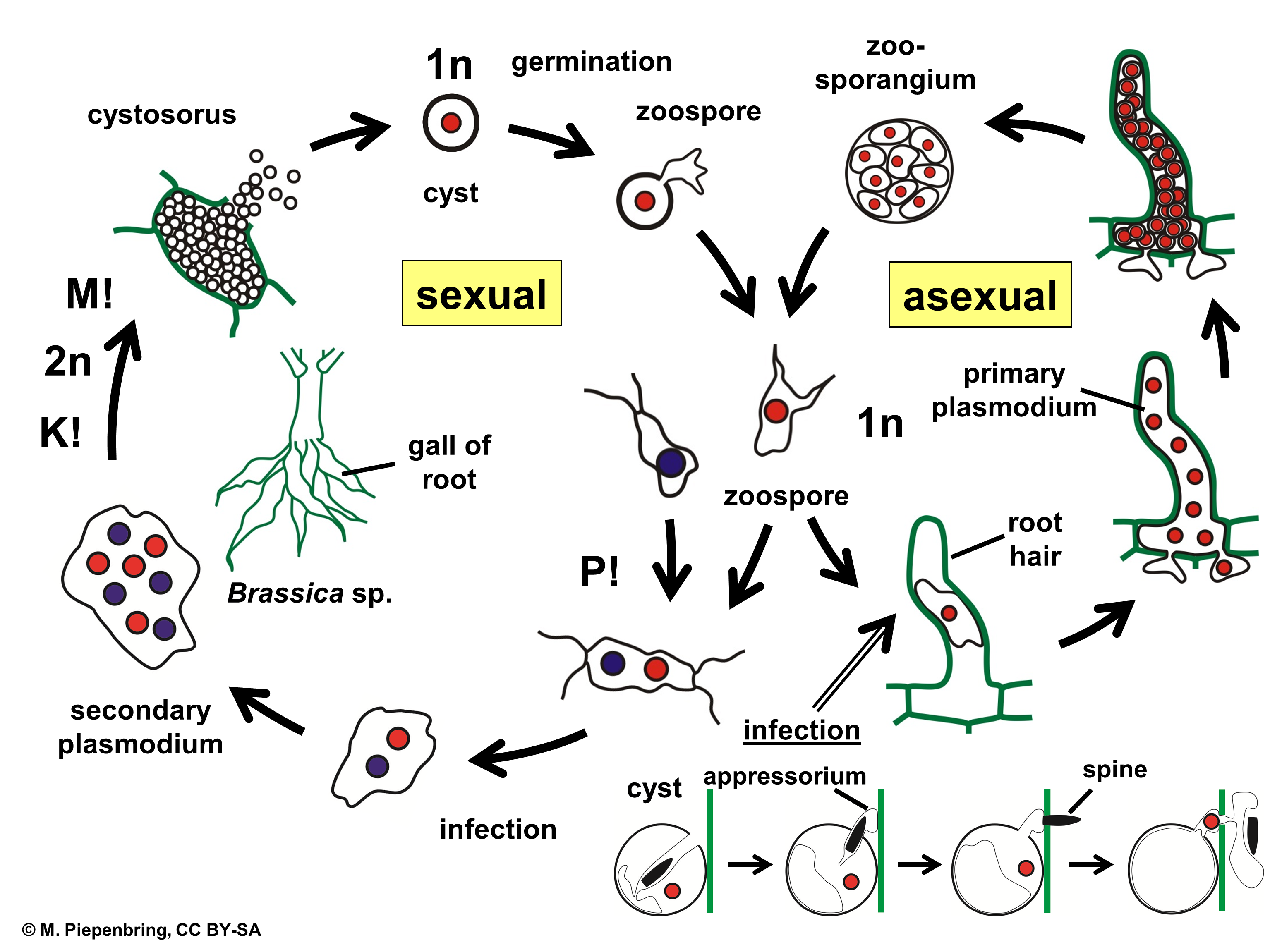 Biologische Schemata, gezeichnet und freigegeben von M. Piepenbring